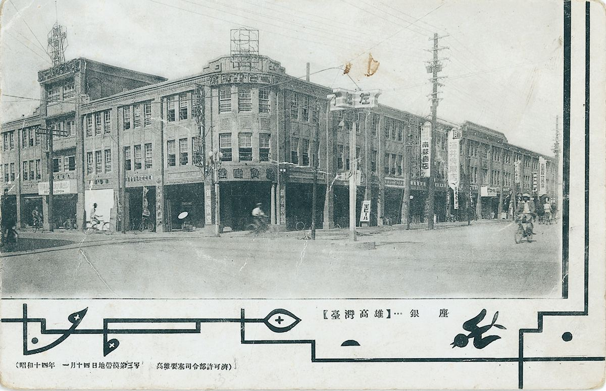 中文（台灣）: 高雄銀座通